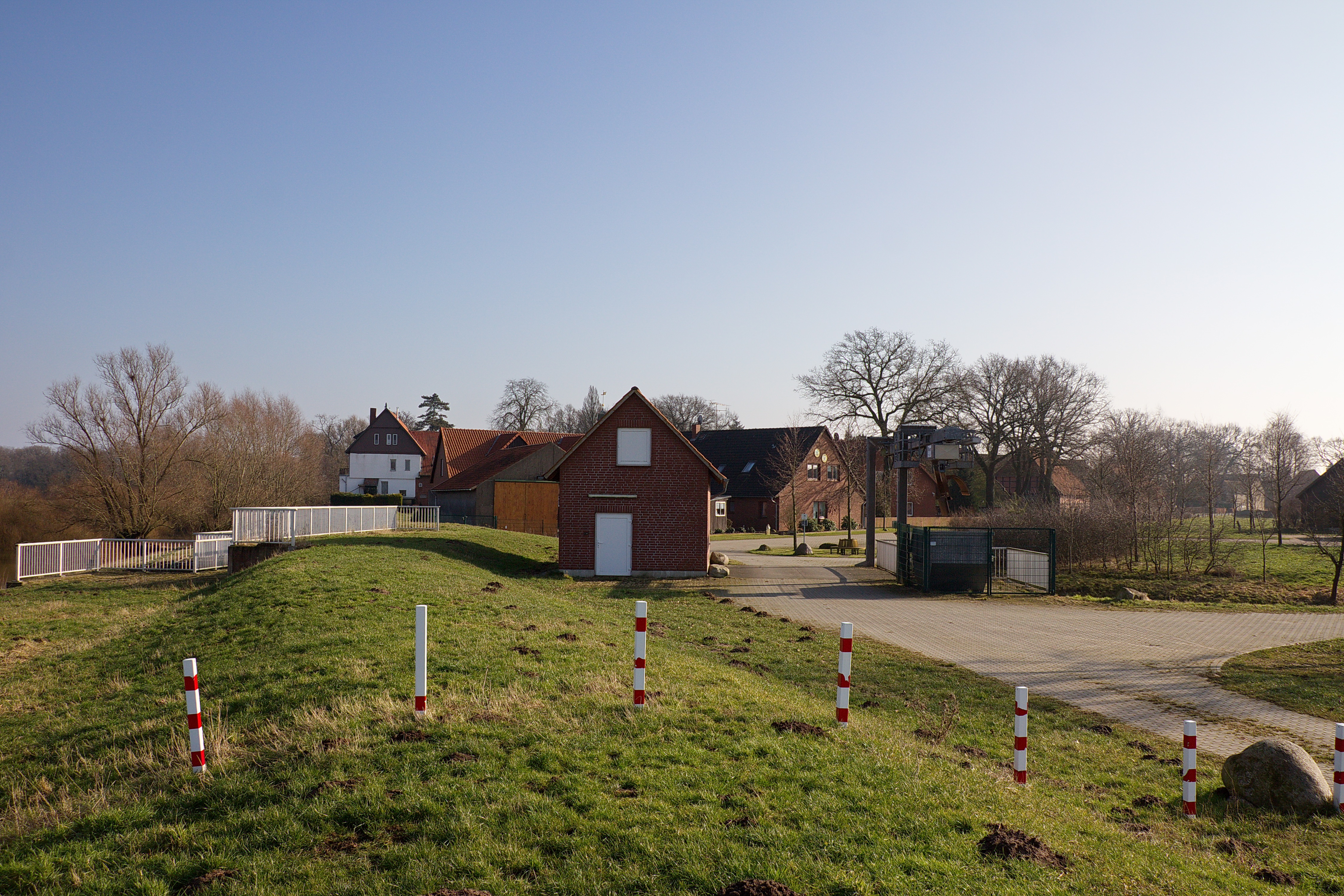 Frankenfeld an der Aller in Niedersachsen, Deutschland